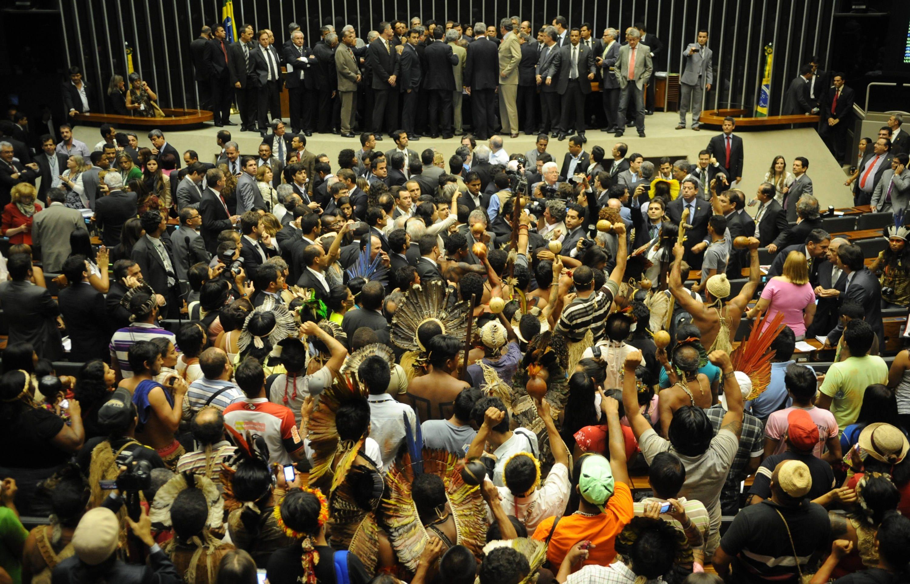 Brasília – Revoltados com a criação de uma comissão especial para analisar a Proposta de Emenda à Constituição (PEC) 215, que dá ao Congresso Nacional poderes para demarcar terras indígenas, centenas de índios invadiram o plenário da Câmara dos Deputados e tomaram as cadeiras dos parlamentares.